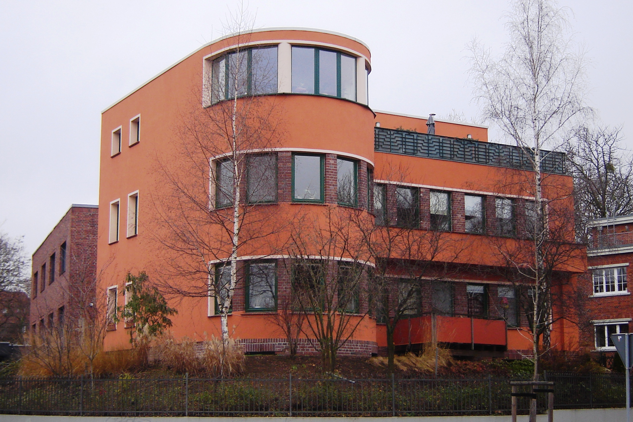 Magdeburg, Erich-Weinert-Str. 19 (Kulturdenkmal)